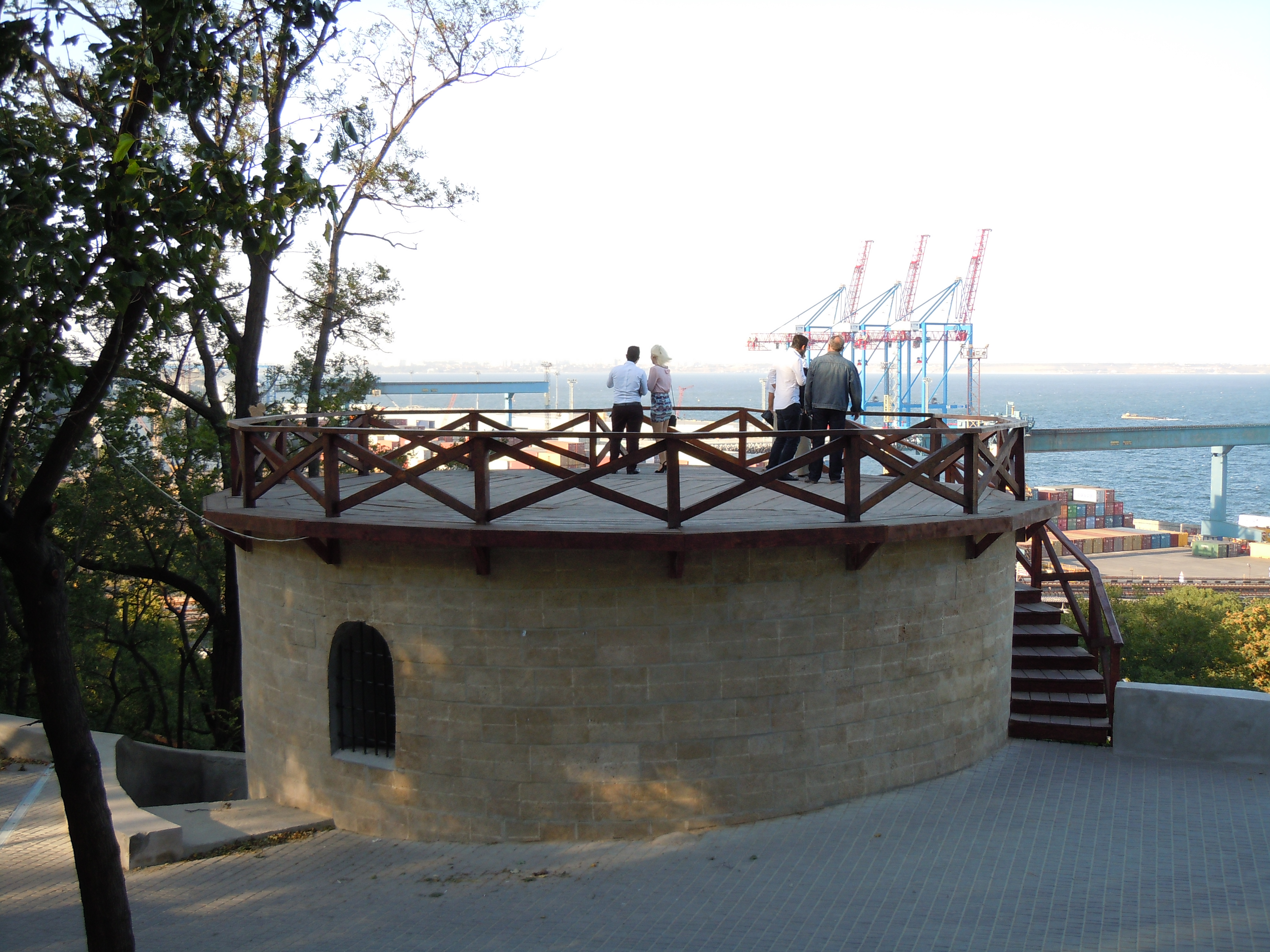 Відновлена Сторожова башта Одеського карантину